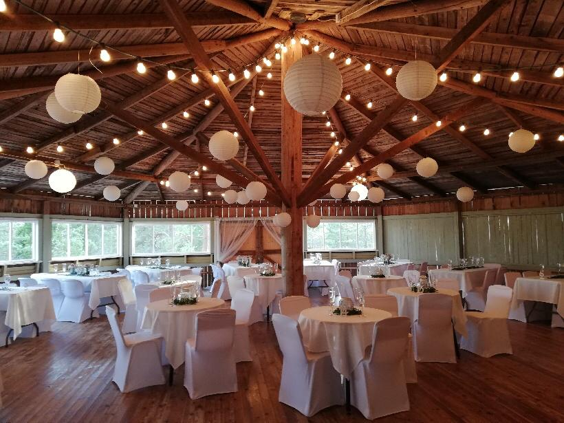 Mahnalan lava sopii mainiosti kesähäihin